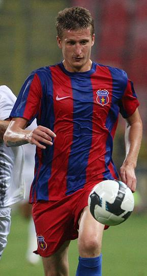 FC Steaua Bukarest - Újpest FC (Euro Liga 2009-2010)